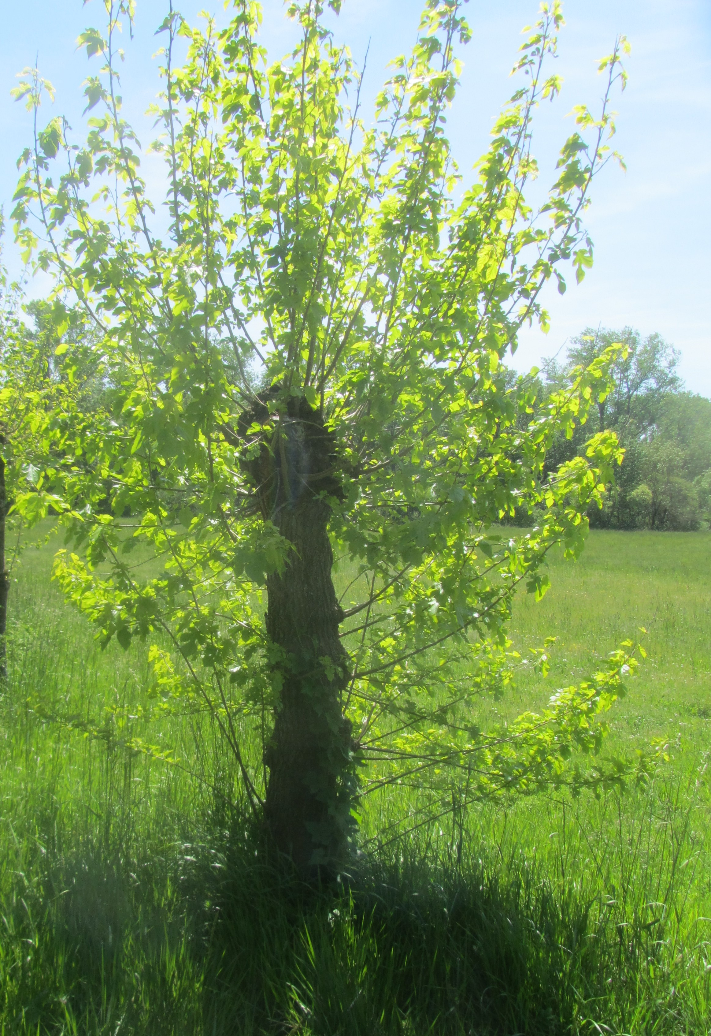 mûrier taillé en têtard, sans doute pour faciliter la cueillette des feuilles